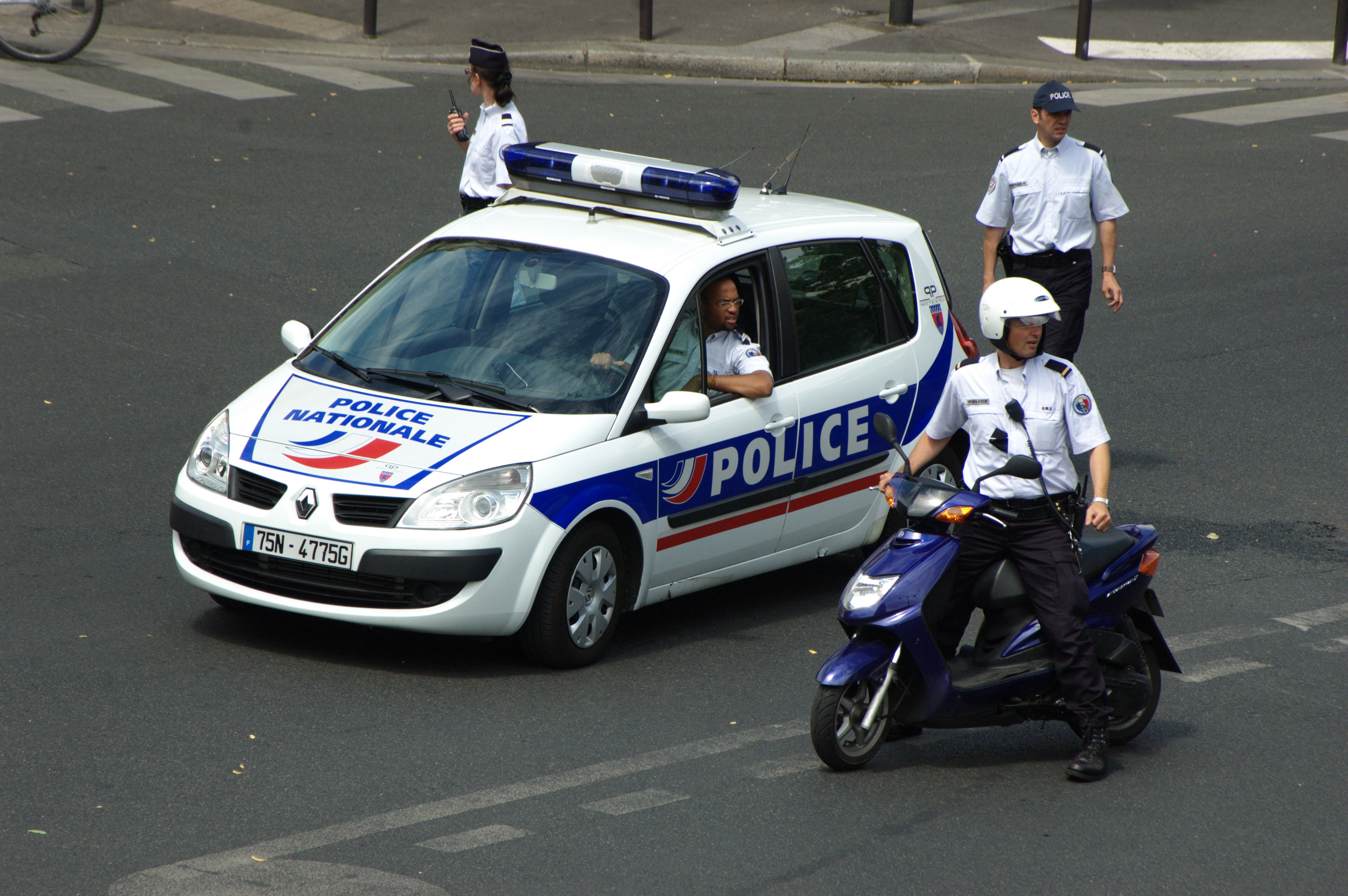 Police nettoyant le carrefour en vue du passage d'une manifestation.